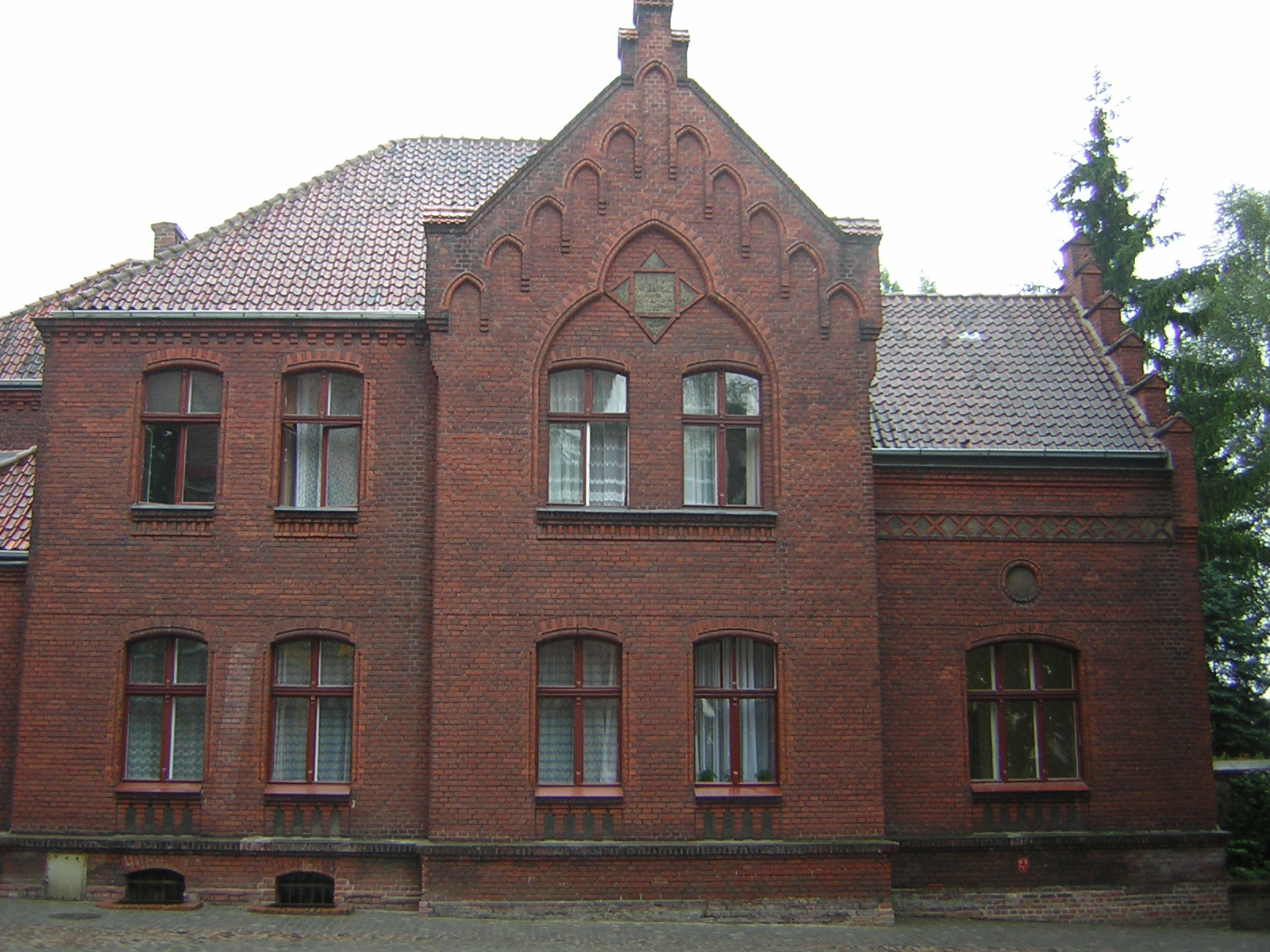 Neogotycka plebania przy Kościele Przemienienia Pańskiego w Iławie (fragment}